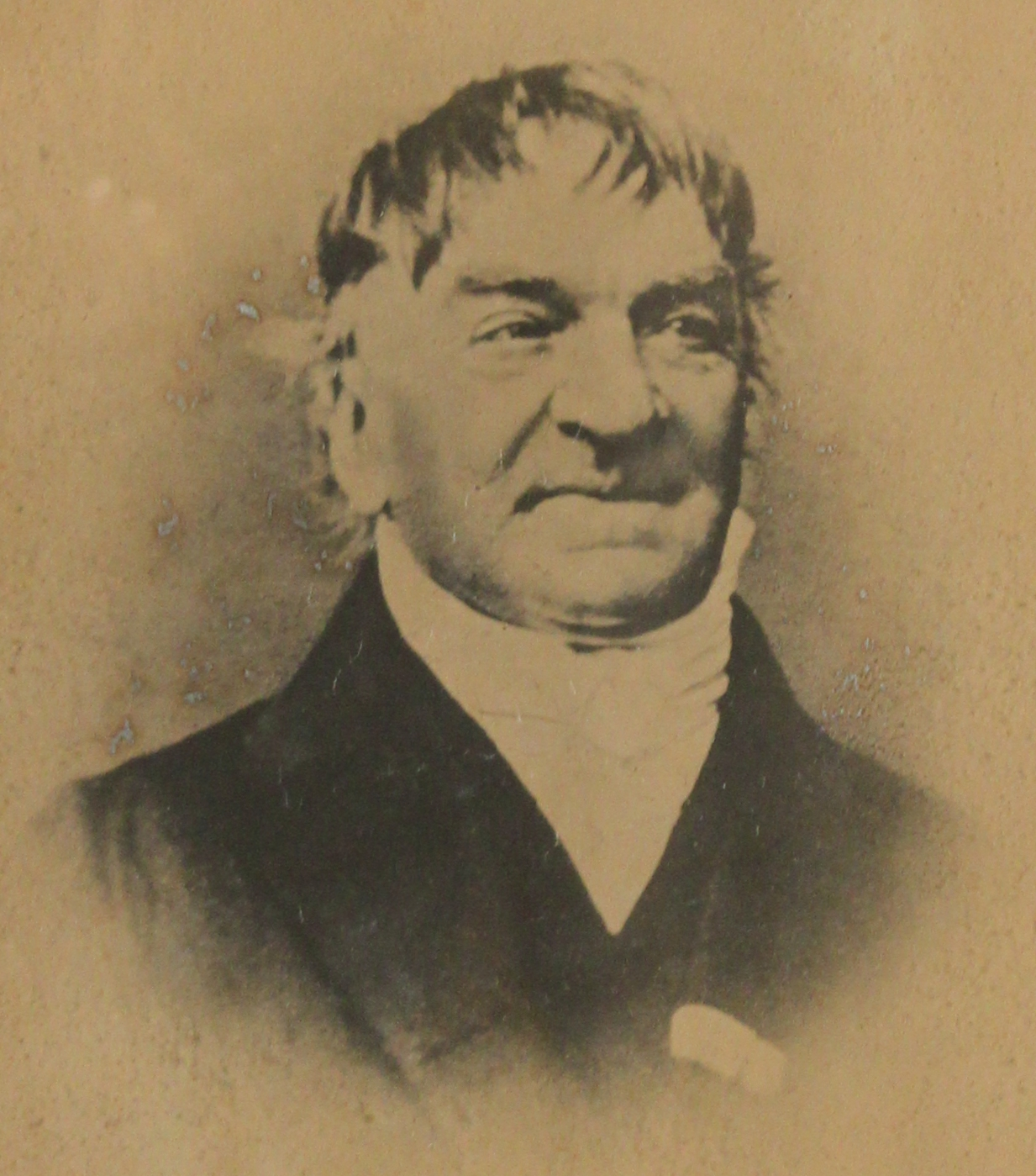 Johann Kaspar Aiblinger, Photolithographie um 1850, Museum Wasserburg a. Inn, Inv. Nr. 2259a